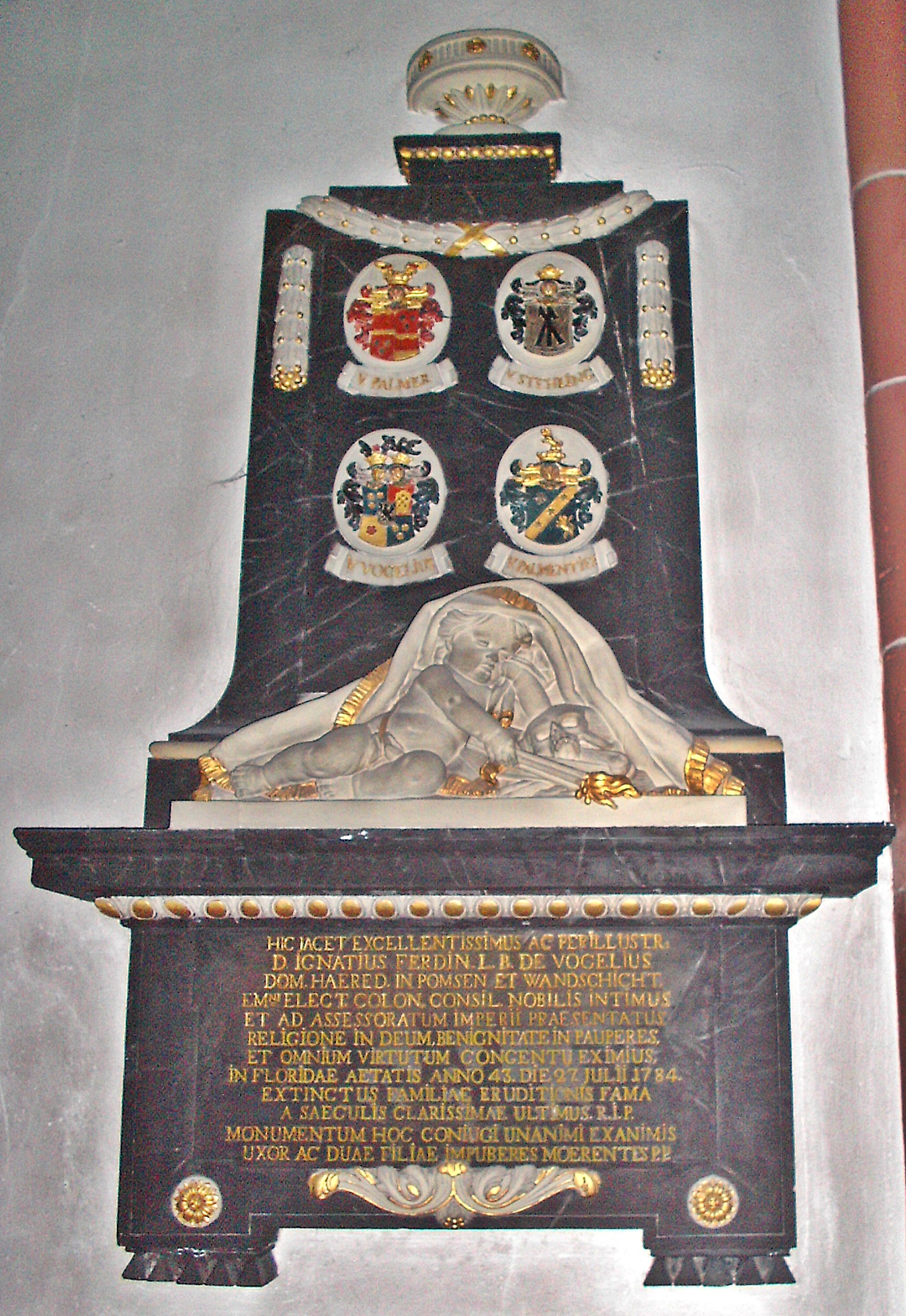 Epitaph Ignatius Ferdinand von Vogelius (1740-1784), kurkölnischer Geheimer Rat, Ortsherr zu Wattenheim, Pfalz, in der Liebfrauenkirche zu Worms